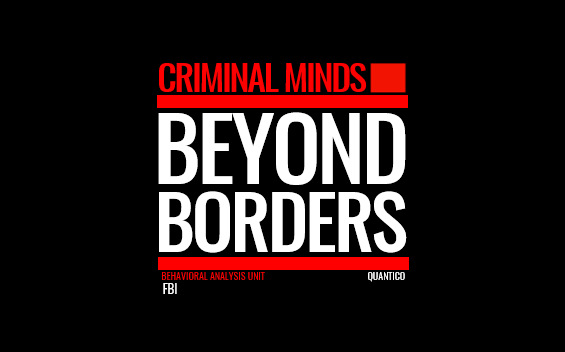 Diese Grafik zeigt das Logo der TV Serie Criminal Minds Beyond Borders